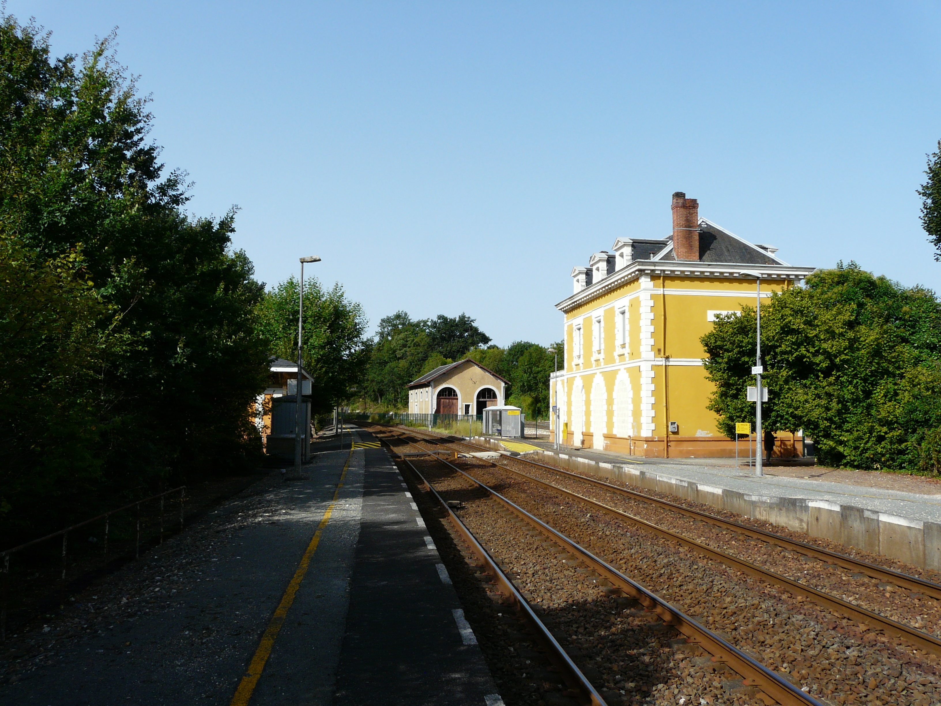 Les voies en direction de Bordeaux, gare de Neuvic, Dordogne, France.